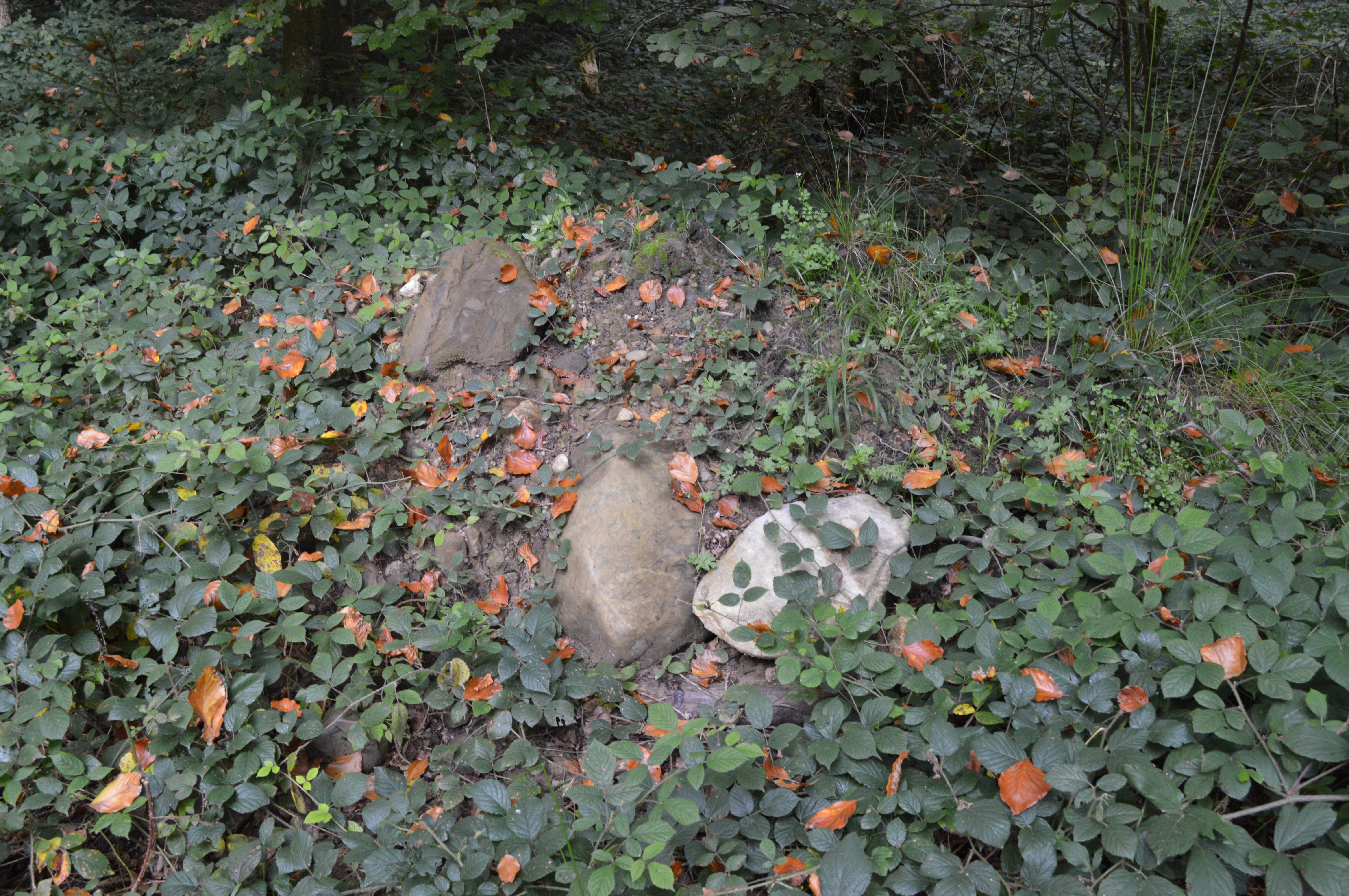 Steinhaufen auf dem Waldburgplateau in Häggenschwil